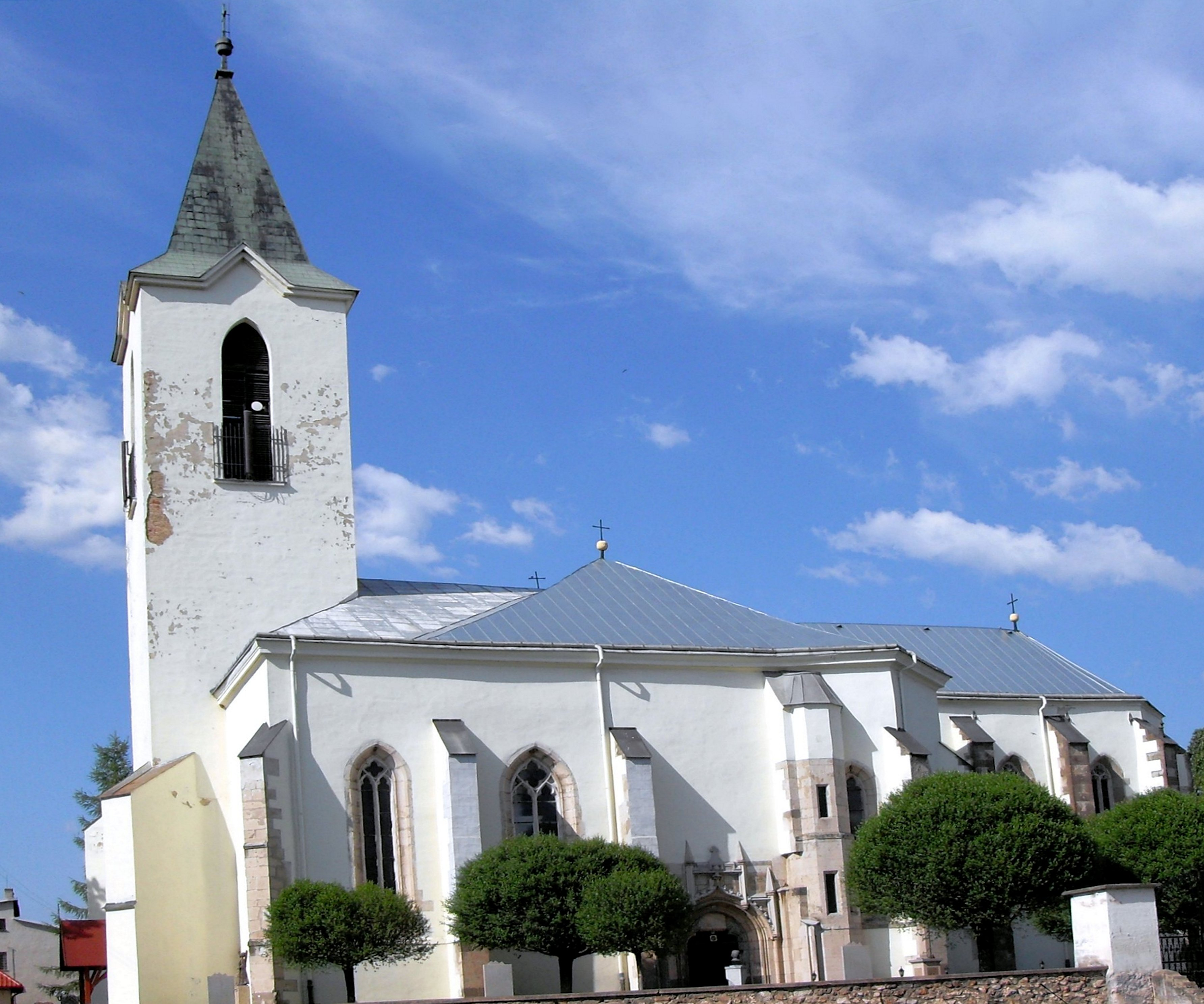 Moldava nad Bodvou, kostol svätého Ducha